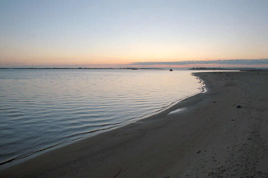 Severnaya Dvina River in Arkhangelsk, Russia